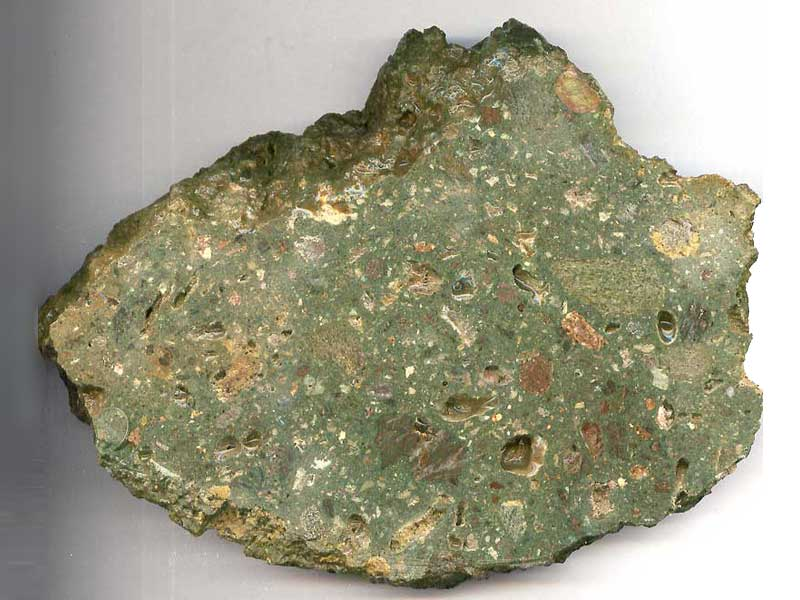 Fragment de brèche d'impactite du cratère d'impact de Rochechouart (France). Suévite de Chassenon Chassenon est une ville située dans le cratère de l'impact. Ce fragment montre une matrice présentant un taux de fusion assez élevé dans laquelle se sont mélangés des morceaux de la roche du socle. La matrice présente une coloration verdatre spécifique.